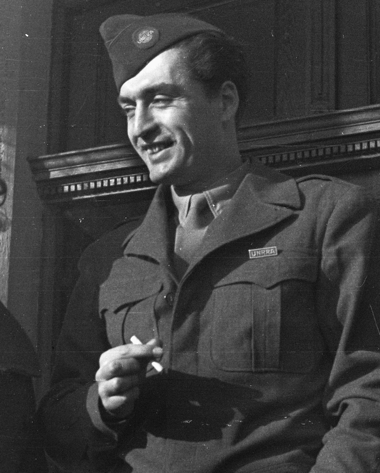 Collectie / Archief : Fotocollectie Anefo Reportage / Serie : [ onbekend ] Beschrijving : Tehuis in Duitsland voor Joodse mensen, die ontslagen zijn uit concentratiekampen en dergelijke Datum : 11 maart 1946 Locatie : Duitsland Trefwoorden : CONCENTRATIEKAMPEN, MENSEN, ONTSLAGEN Fotograaf : Jozefson, […] / Anefo Auteursrechthebbende : Nationaal Archief Materiaalsoort : Negatief (zwart/wit) Nummer archiefinventaris : bekijk toegang 2.24.01.05 Bestanddeelnummer : 901-5572